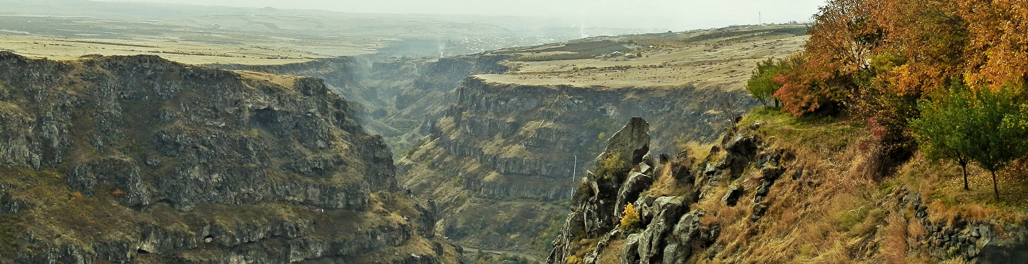 The canyon carved by the Kasagh River next to the 13th century Armenian monastery Hovhannavank.